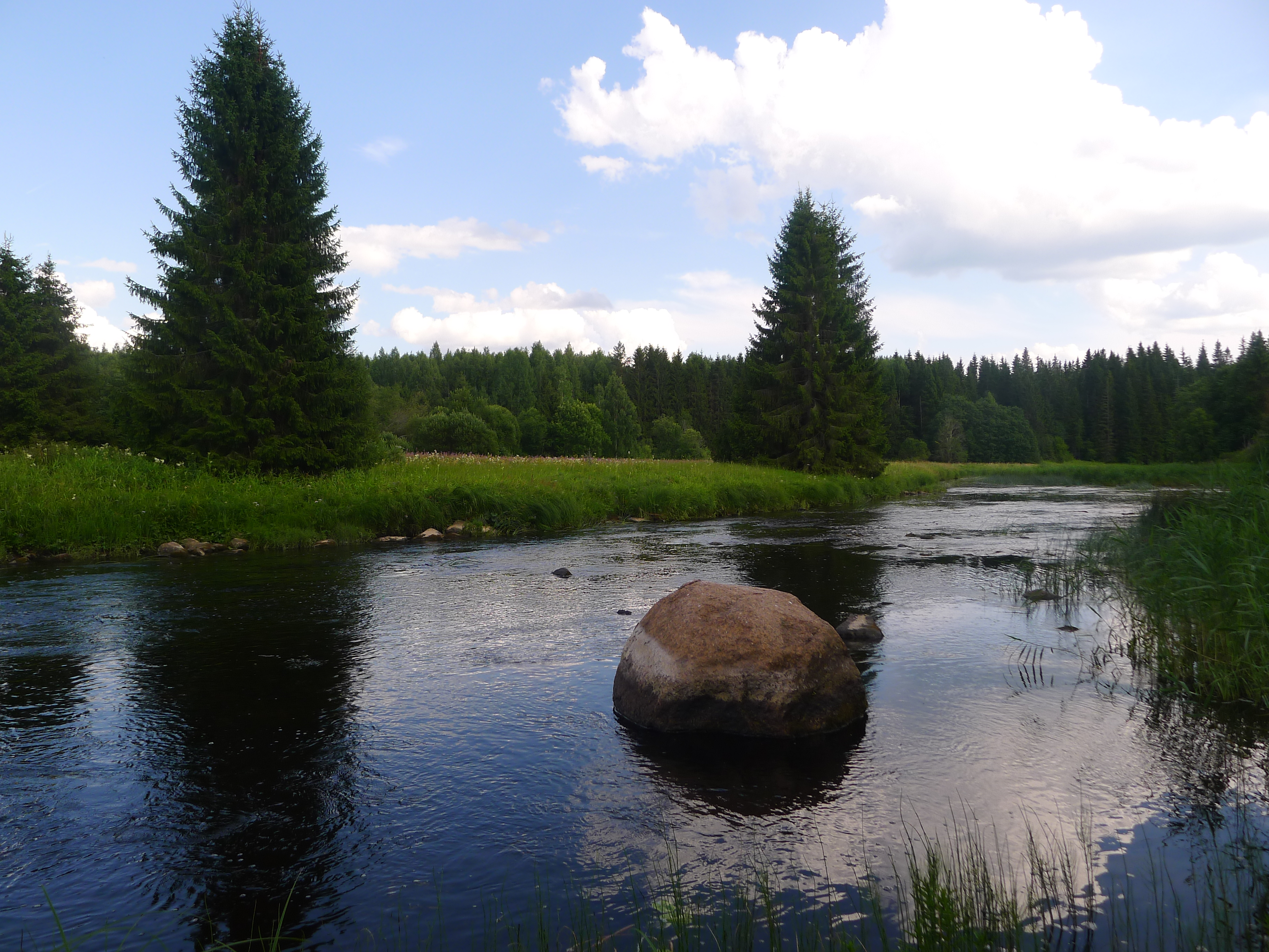 Заказник Ящера-Лемовжа: включает части заказника "Прилужский" и заказника "Бассейн реки Кемка (Среднелужский)" в границах Лужского и Волосовского районов Ленинградской области, Волосовский район, Ленинградская область This image is related to the protected area of Russia number 4710016